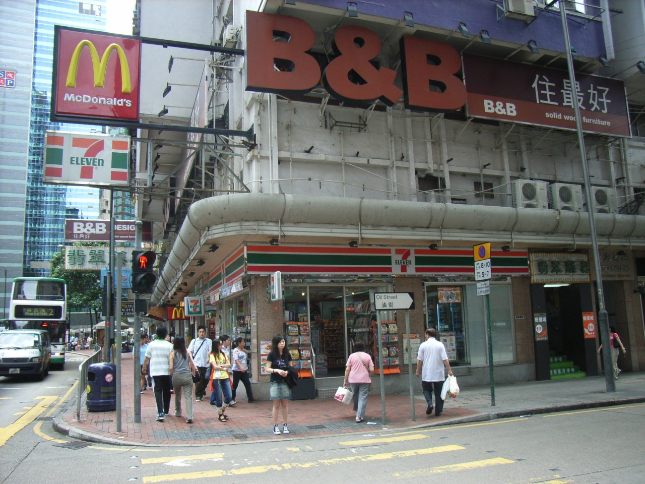 Street in Tin Hau district, Hong Kong User:Tin Ho SP Lim